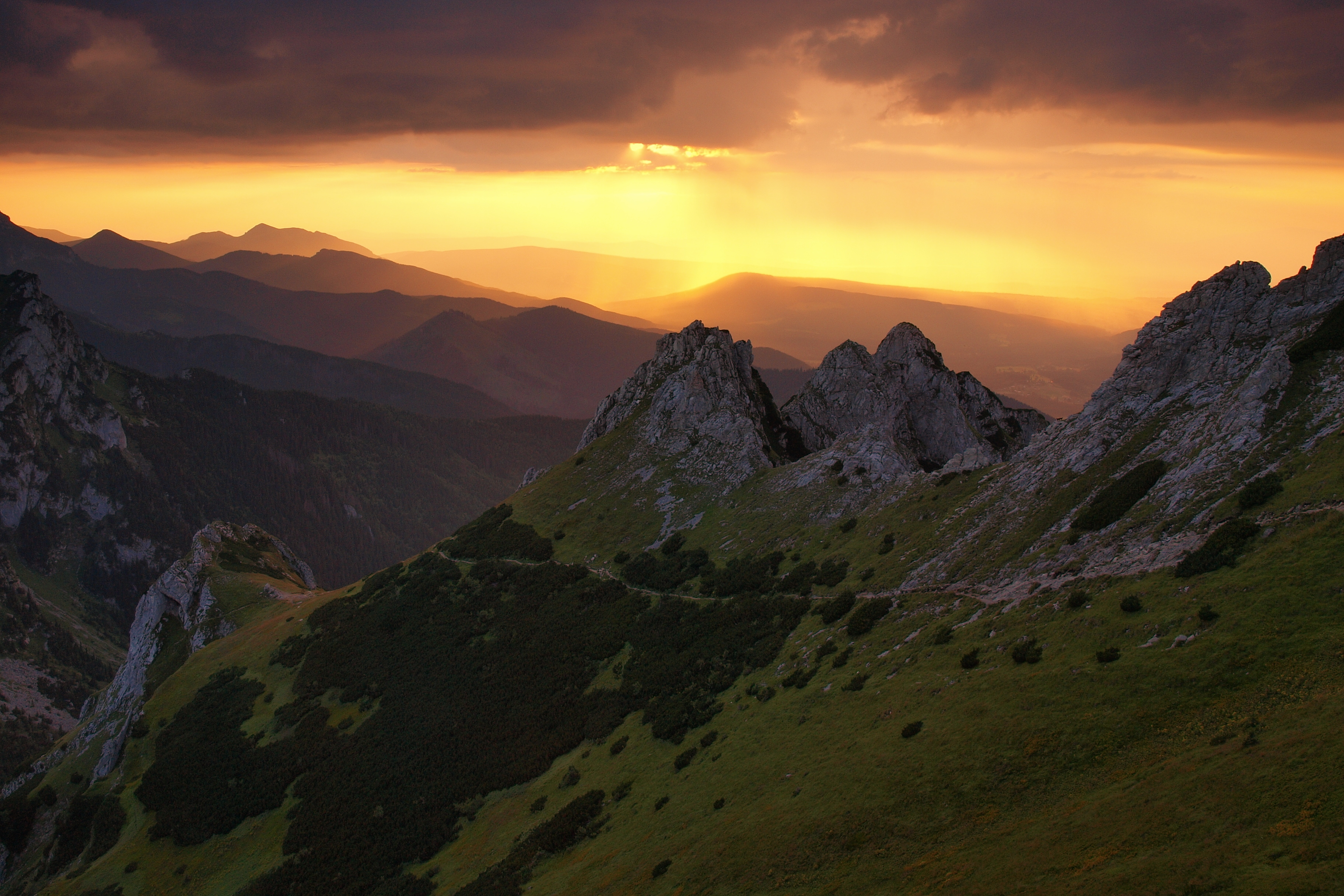 Obszar specjalnej ochrony ptaków Tatry. This is a photography of Natura 2000 protected area with ID PLC120001